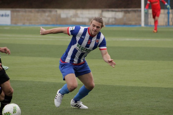 Samuel Piette, Izarra